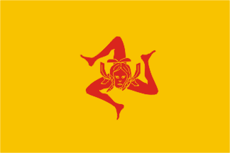 Banadera del Moviment Independentista Sicilià